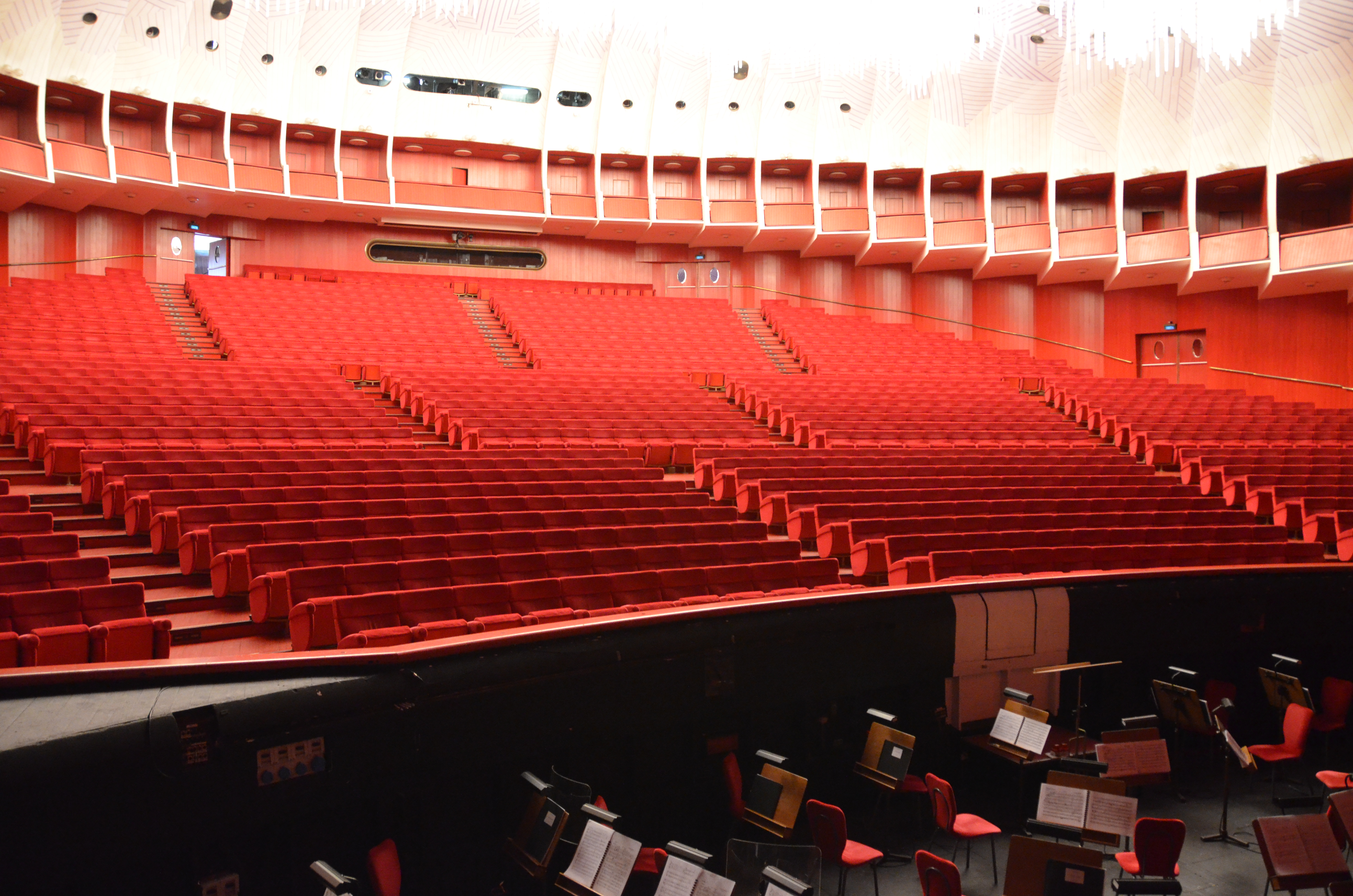 Teatro Regio de Torí - Llotges